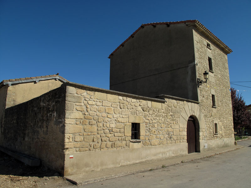 Calle de la localidad de Suzana (Miranda de Ebro, España)